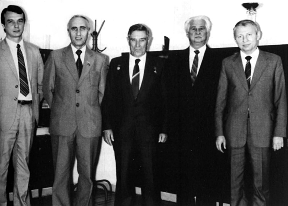 Александр Негода, Юрий Сметанин, Василий Будник, Николай Герасюта, Леонид Кучма